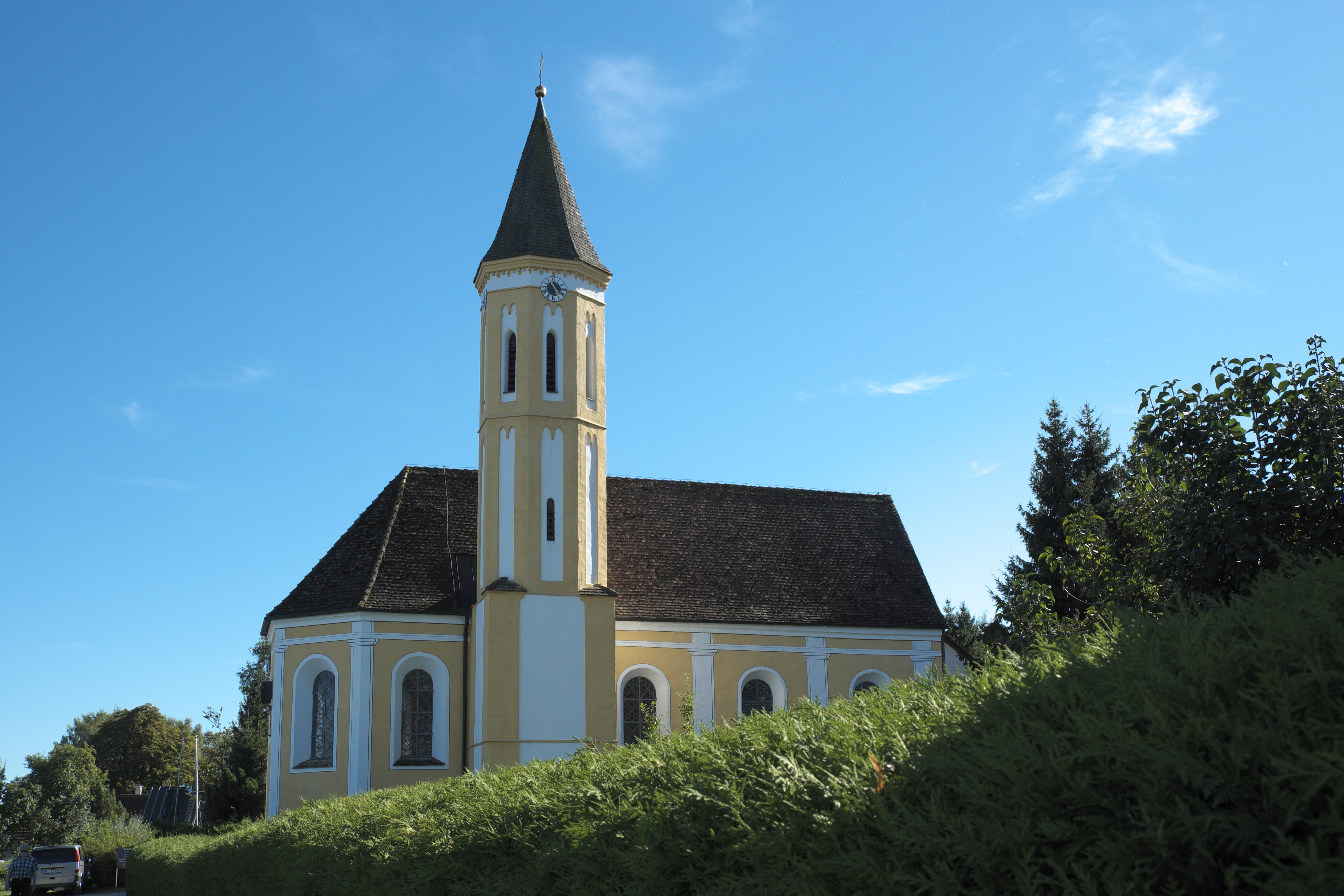 Katholische Filialkirche St. Alban in Dießen am Ammersee im Landkreis Landsberg am Lech (Bayern/Deutschland)